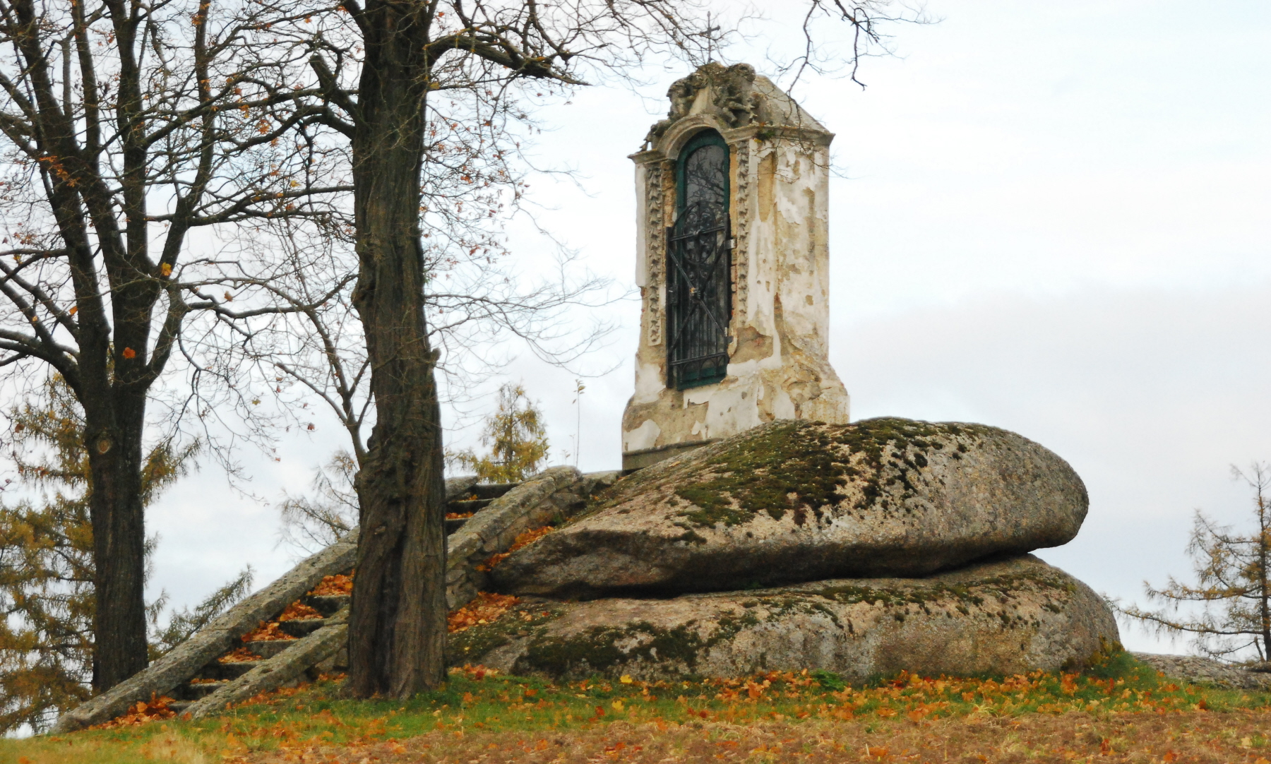 Naturdenkmal Kolomanistein bei Eisgarn in Niederösterreich